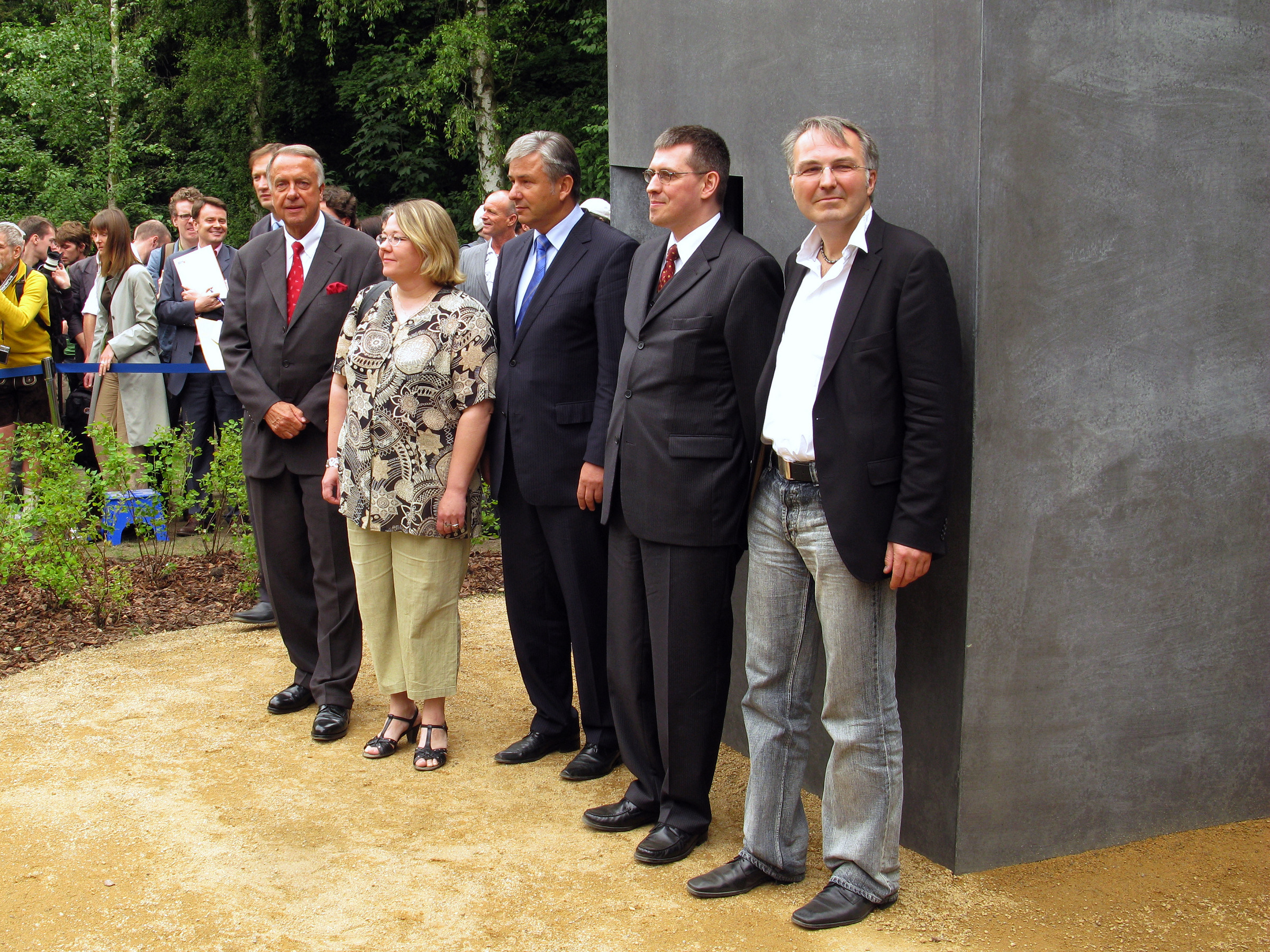 Bei der Eröffnung des Denkmals für die im Nationalsozialismus verfolgten Homosexuellen. von links nach rechts: Bernd Neumann, Linda Freimane (ILGA), Klaus Wowereit, Günter Dworek (LSVD) und Albert Eckert (Denkmalsinitiative). 27. Mai 2008, Berlin-Tiergarten